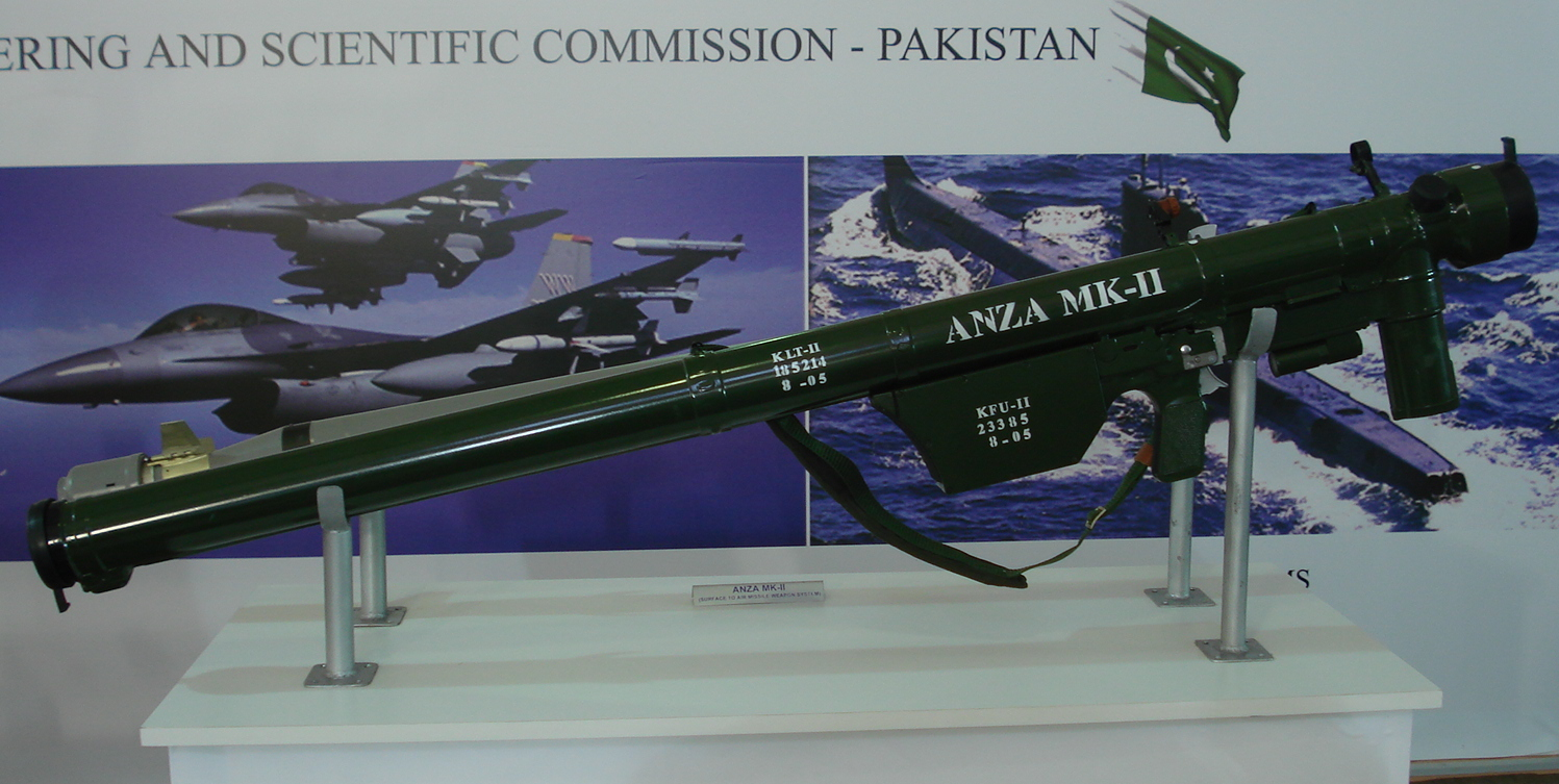 IDEF '07 Savunma Fuarı'nda çekildi.ANZA MK.23 Mayıs 2007